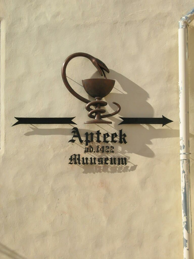 Raeapteek